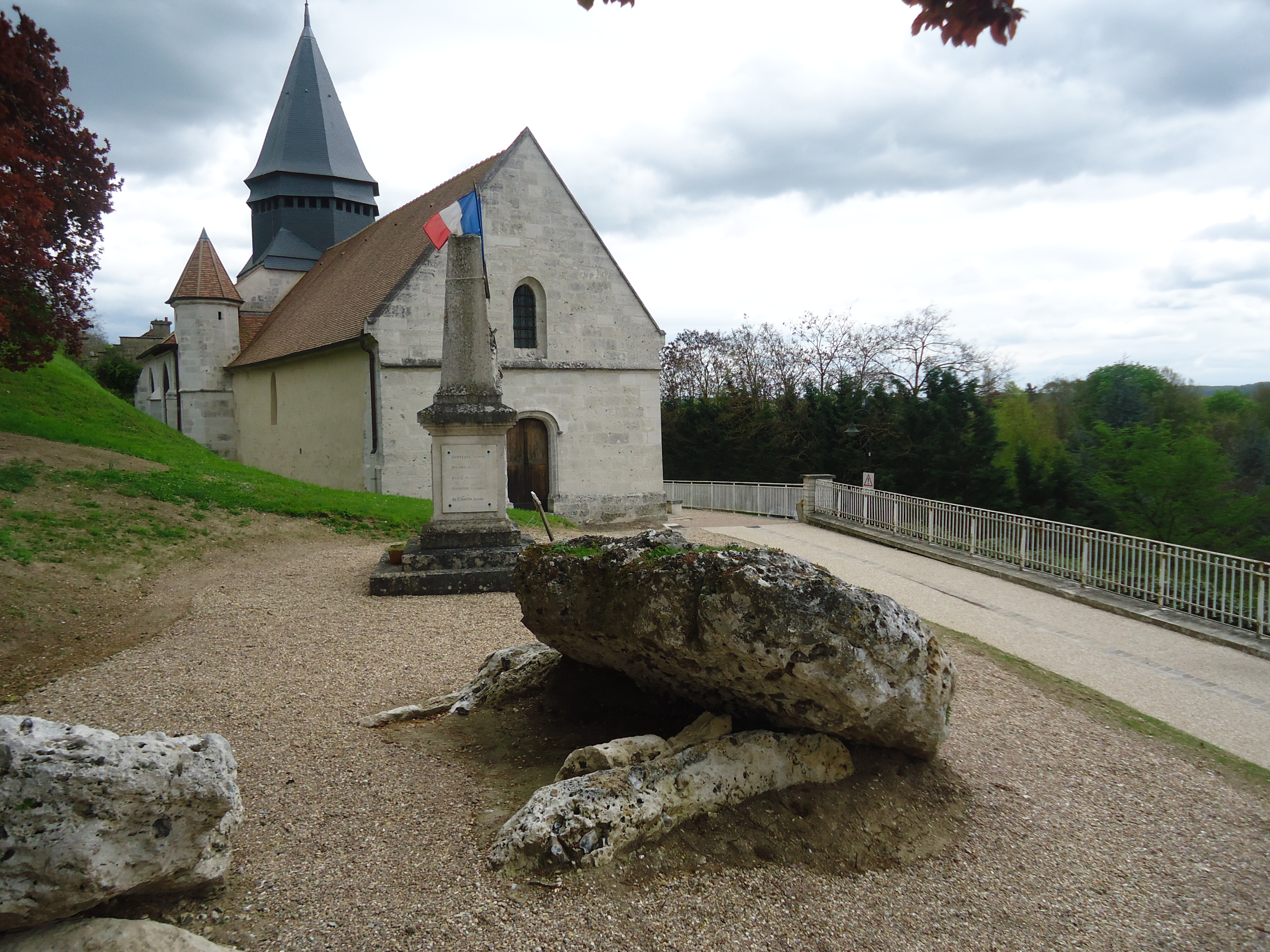 Dolmen de la Pierre de Ste Radegonde à Giverny dans l'Eure